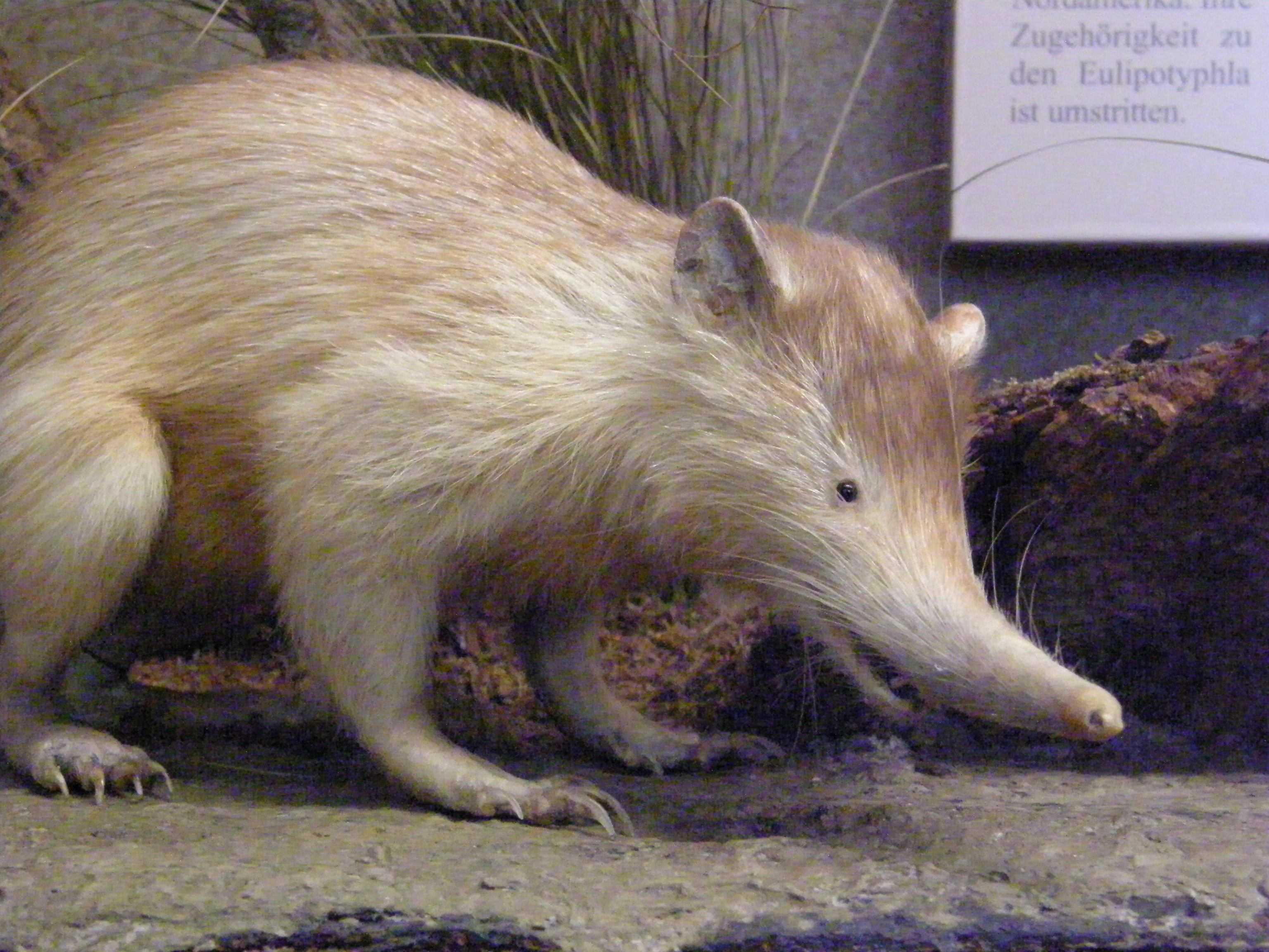 Hispaniolan Solenodon - Solenodon paradoxus